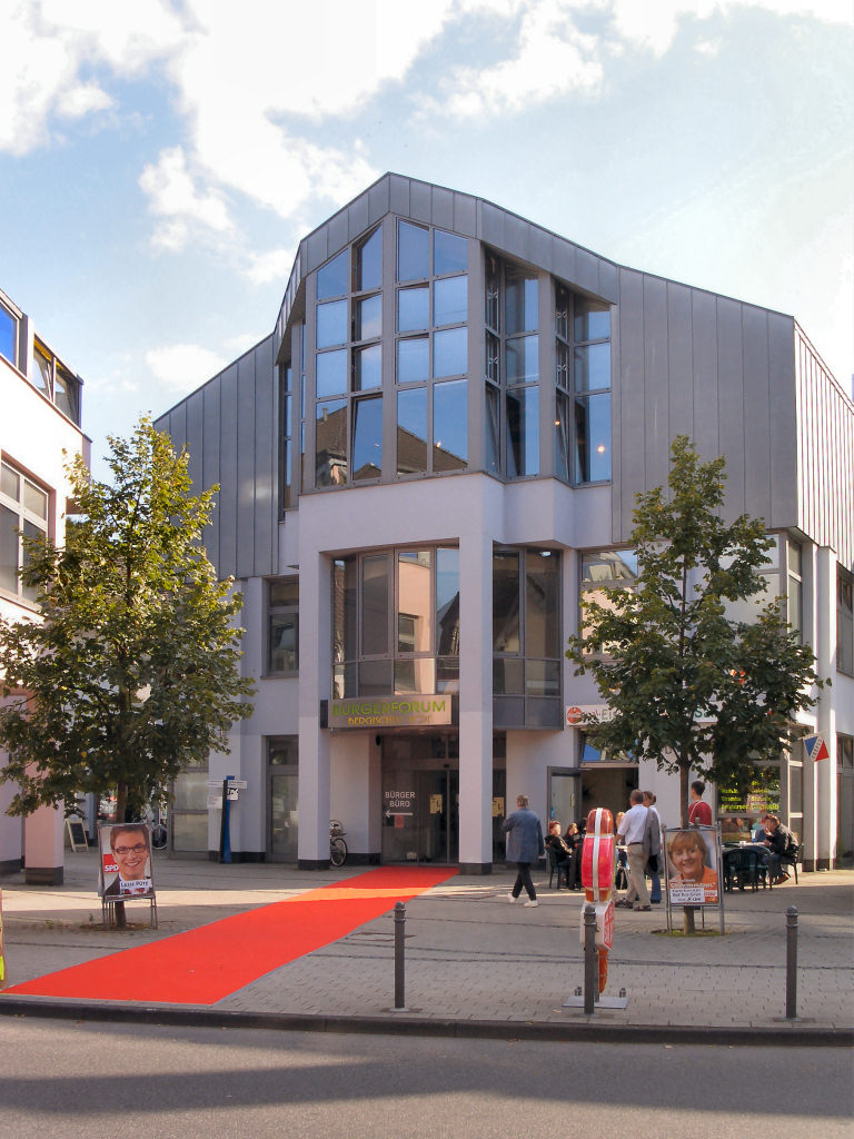 Bürgerforum und Stadtverwaltung in Rösrath-Hoffnungsthal. Anmerkung zum roten Teppich: Für gewöhnlich wird für die Besucher des Bürgerforums bzw. der Stadtverwaltung kein roter Teppich ausgerollt. Dieser war eine besondere Note für die Gäste einer kulturellen Veranstaltung im Bürgerforum am 17. September 2005.